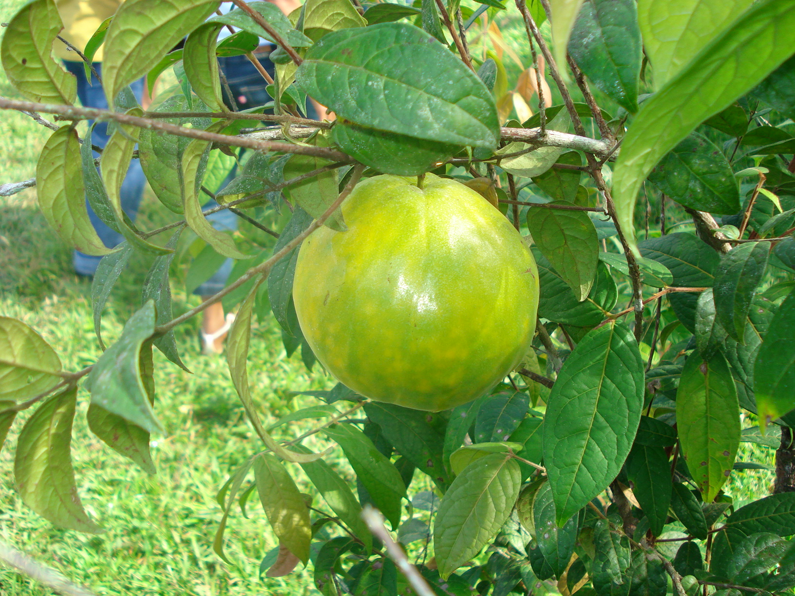 Imagem de Araçá-Boi